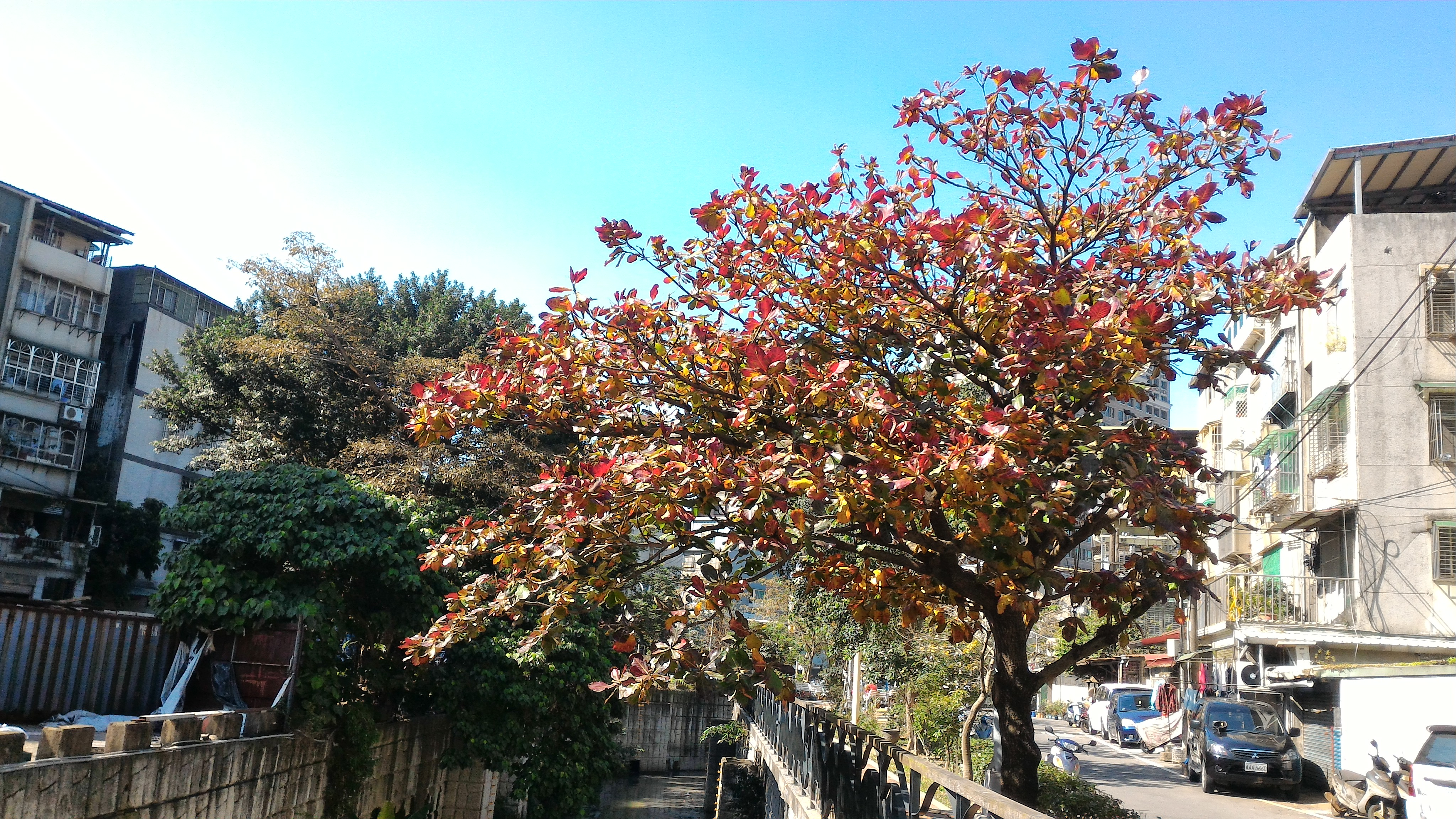 廟仔尾溝畔中山橋與莊敬橋間的這株大葉欖仁在民國101年的廟仔尾溝整建工程中被保留了下來，是一株美麗的景觀樹，在105年初的寒流催化下葉色呈現紅黃綠相間的繽紛色彩。